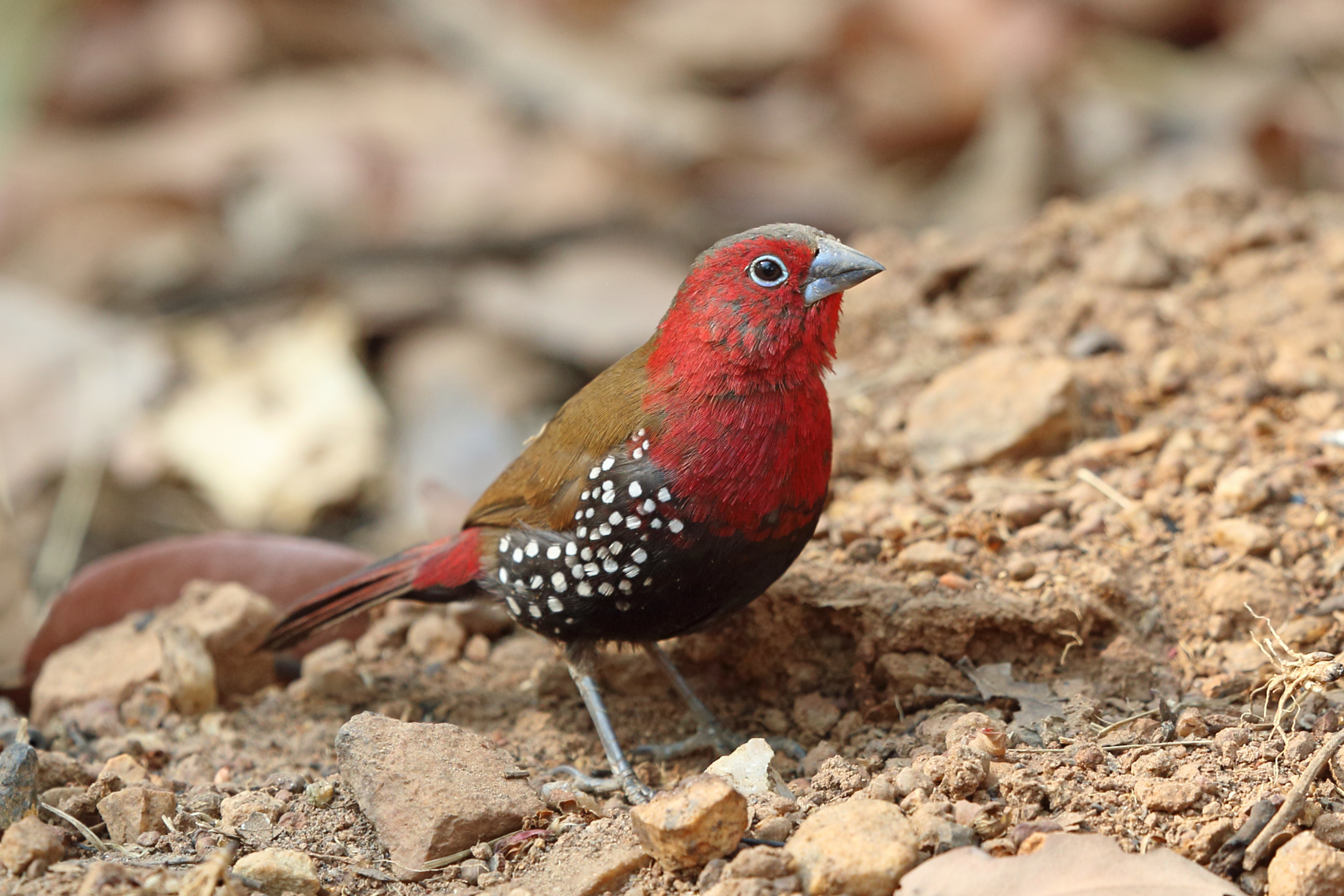 Peters's Twinspot, Sakania, DRC